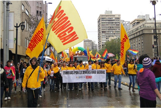 en la XIV Marcha por la diversidad, Santiago de Chile.